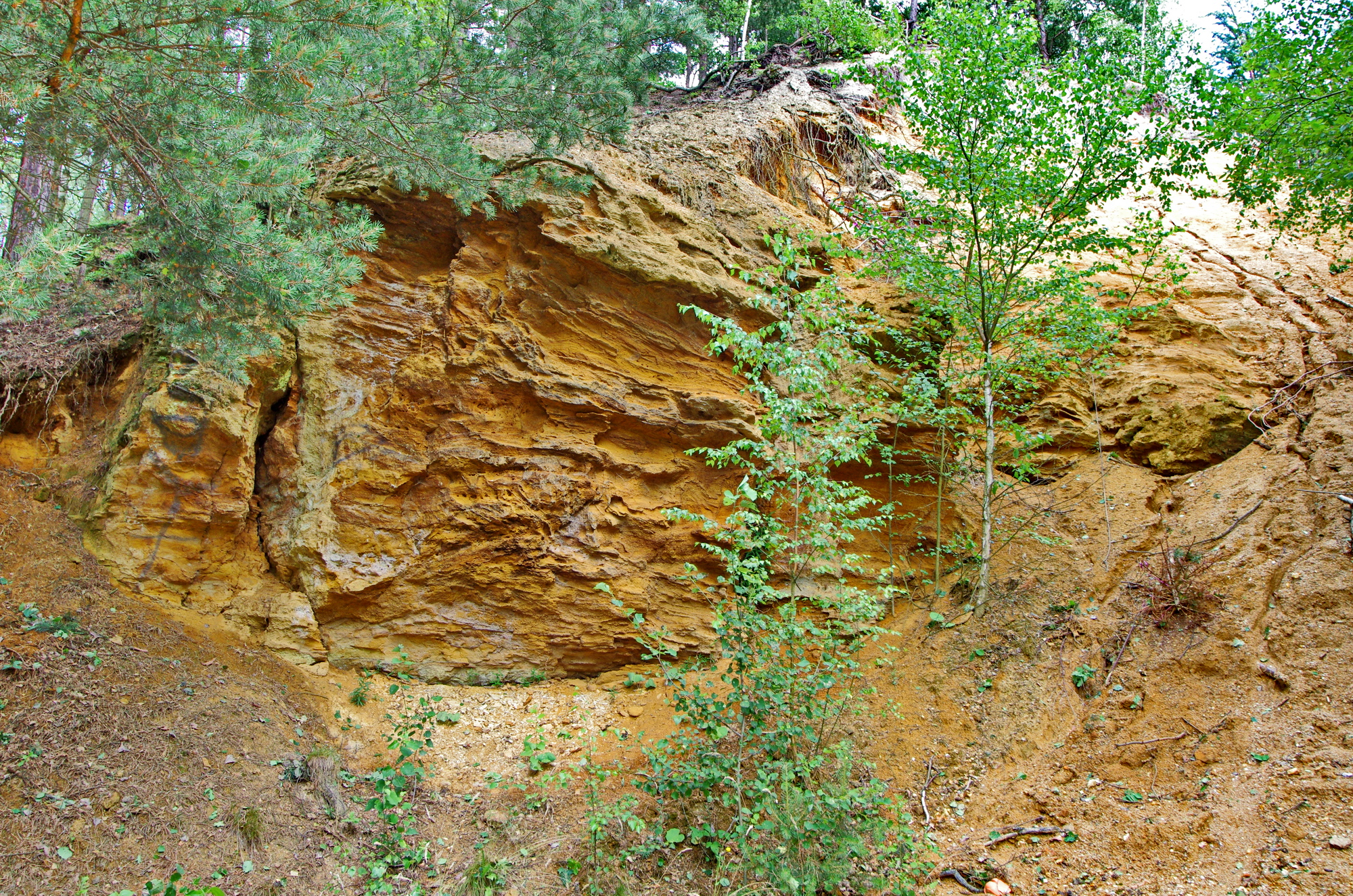 Stará pískovna v vildštejnském souvrství v Chebské pánvi u Kynšperku nad Ohří